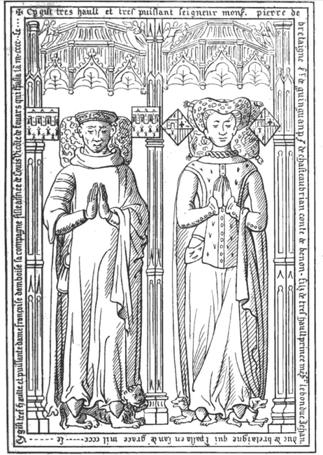 Dessin de la pierre tombale de la sépulture de Pierre II de Bretagne et Françoise d'Amboise, collégiale Notre-Dame de Nantes, France